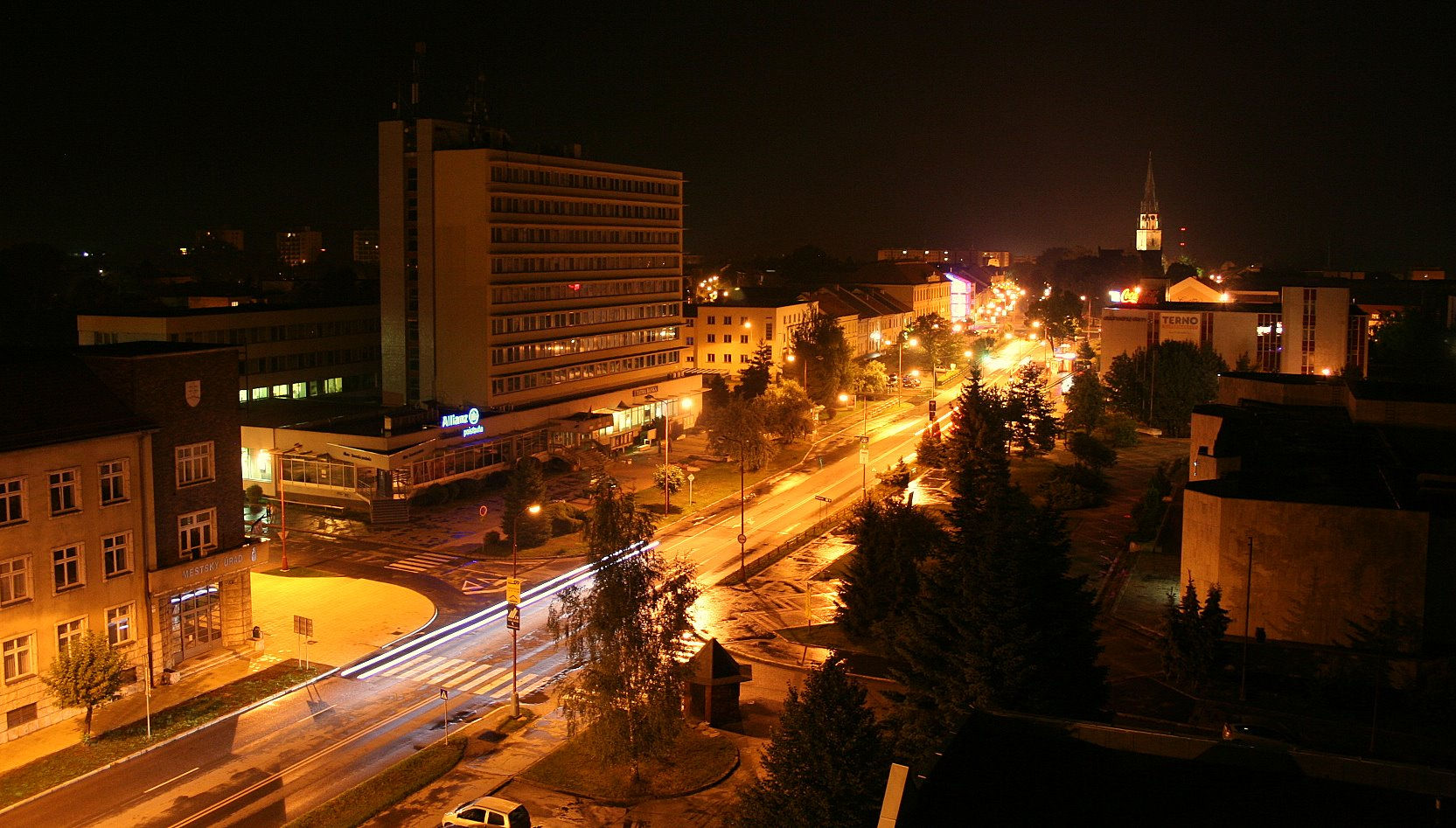 Main Street in Spišská Nová Ves.